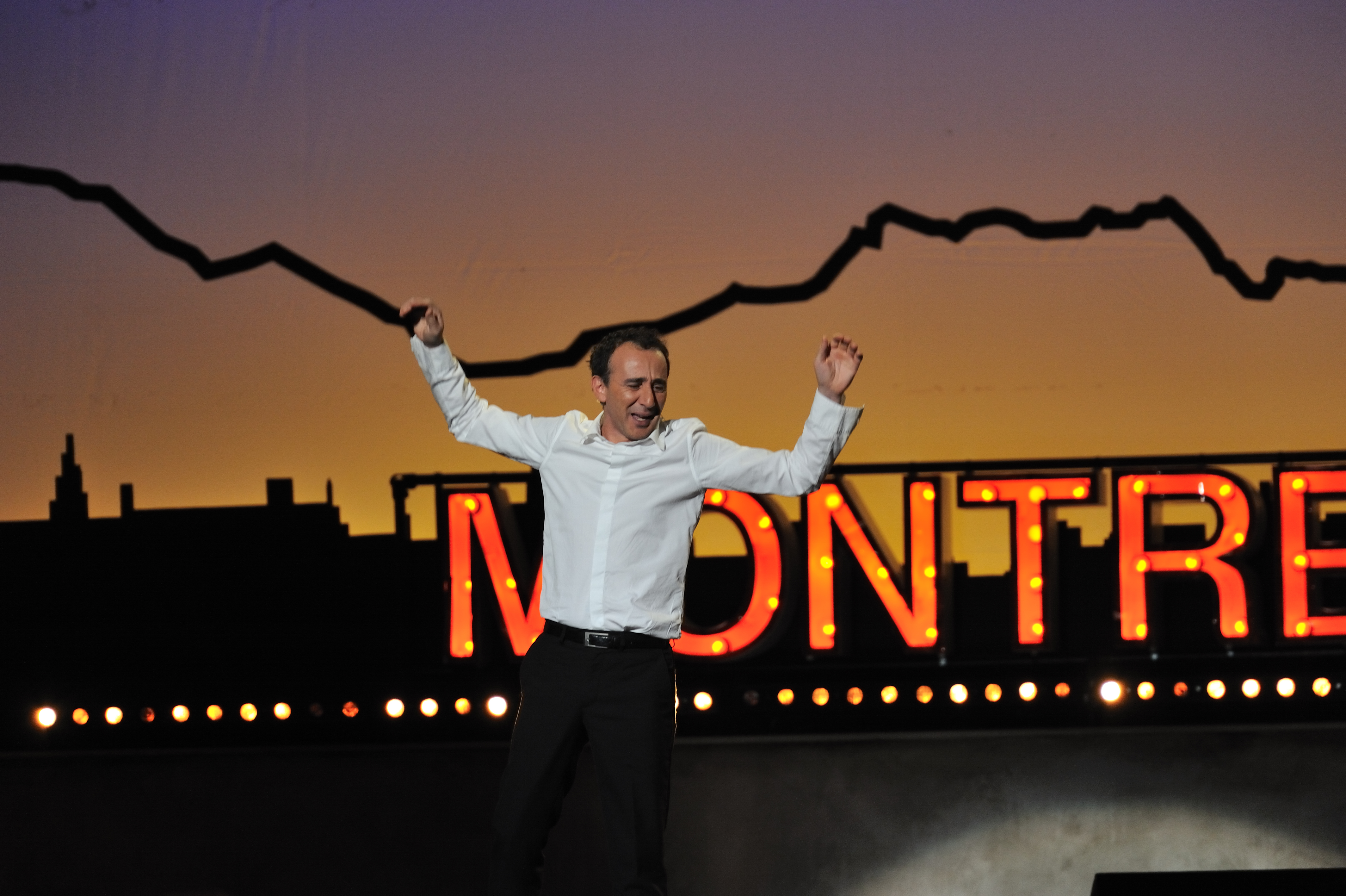 Élie Semoun en plein un sketch durant le Festival de l'humour de Montreux 2010.